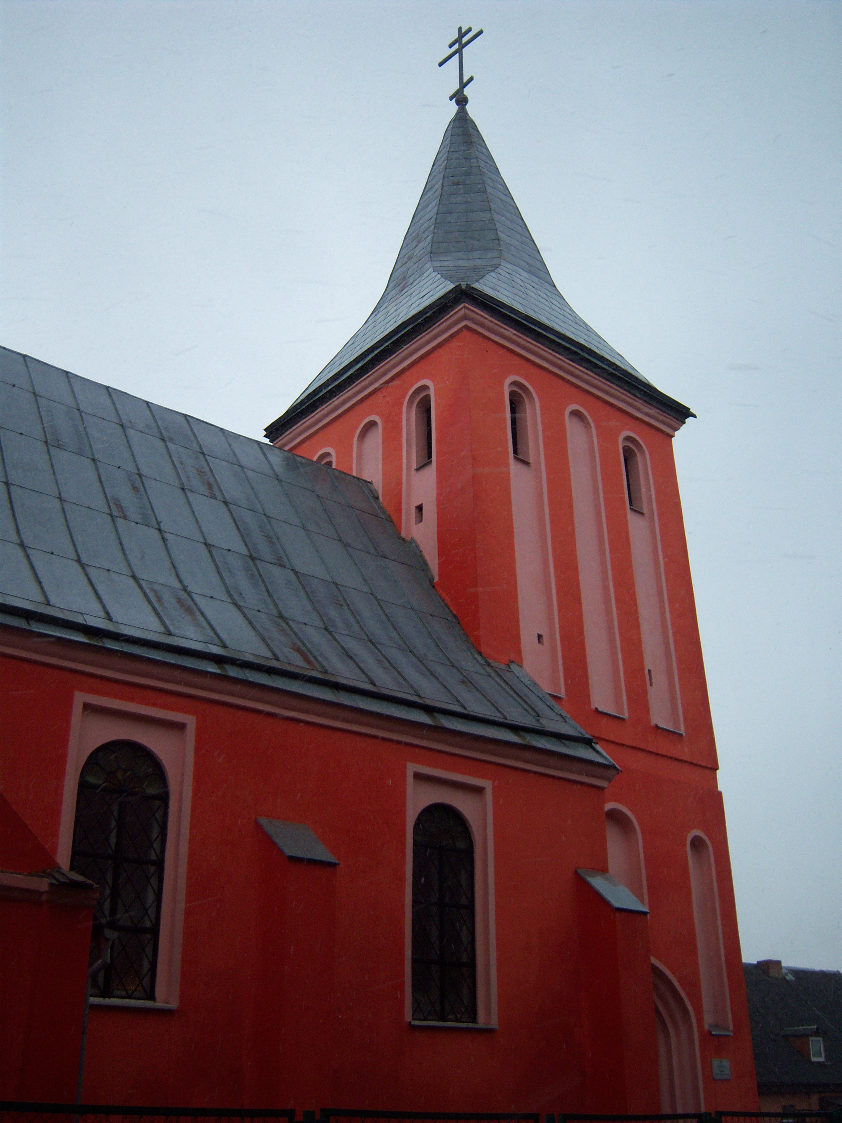 В этой старинной кирхе сейчас православный храм.